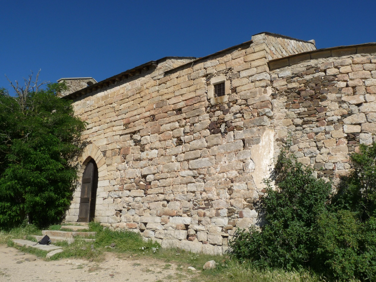 Façade sud et entrée, Chapelle du Belloc, Dorres, Pyrénées-Orientales, France